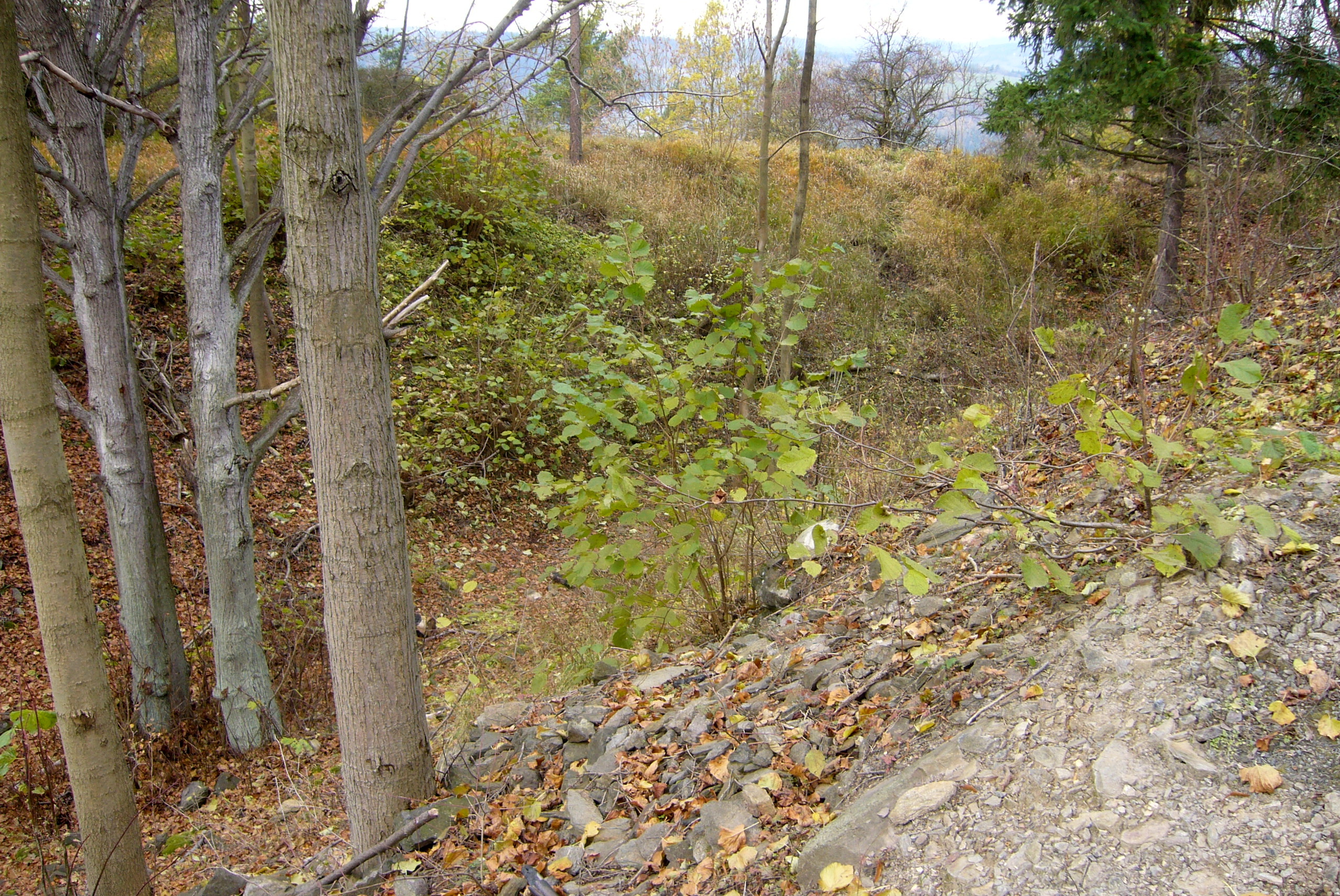 Nevděk - příkop na jižní straně hradu